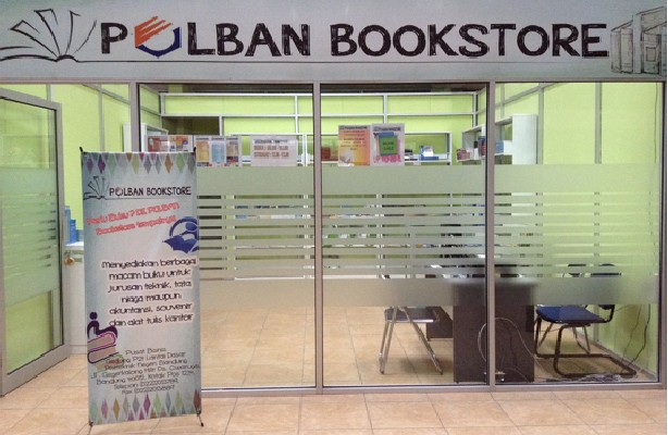 Polban Bookstore